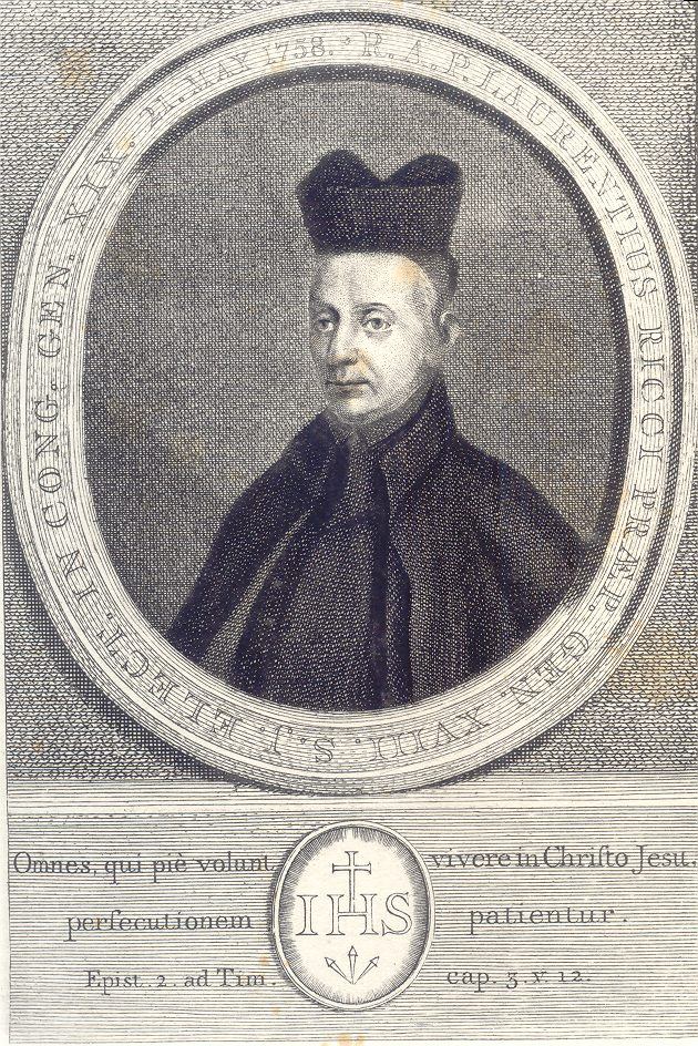 Engraving of Lorenzo Ricci, taken from Alfred Hamy's 'Galerie illustrée de la Compagnie de Jésus', vol. 7, (1893)